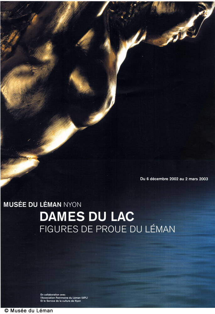 Affiche d'exposition "Dames du lac"